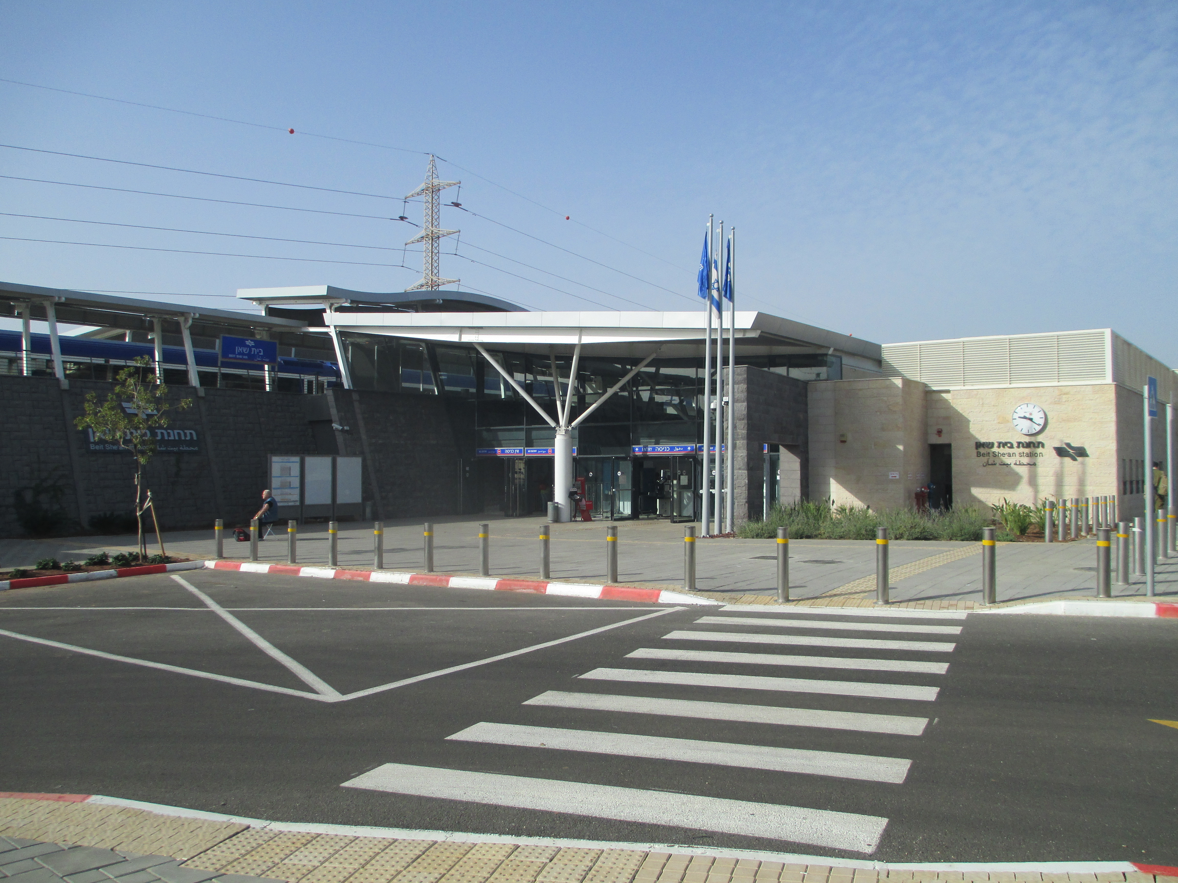 תחנת הרכבת בית שאן